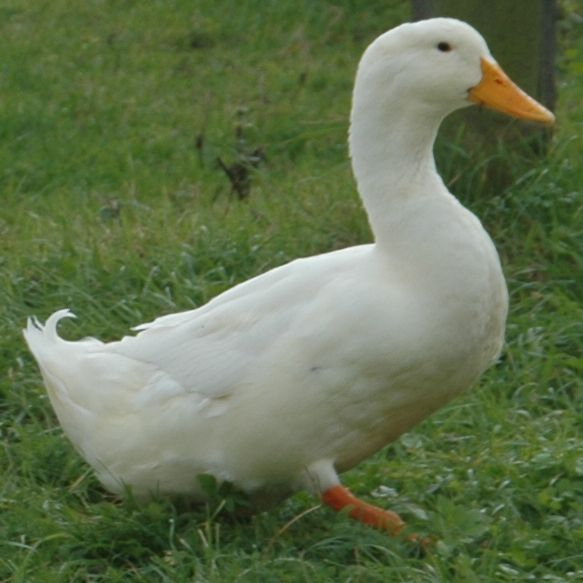 →This file has been extracted from another file: Amerikanische Pekingenten 2013 01.JPG